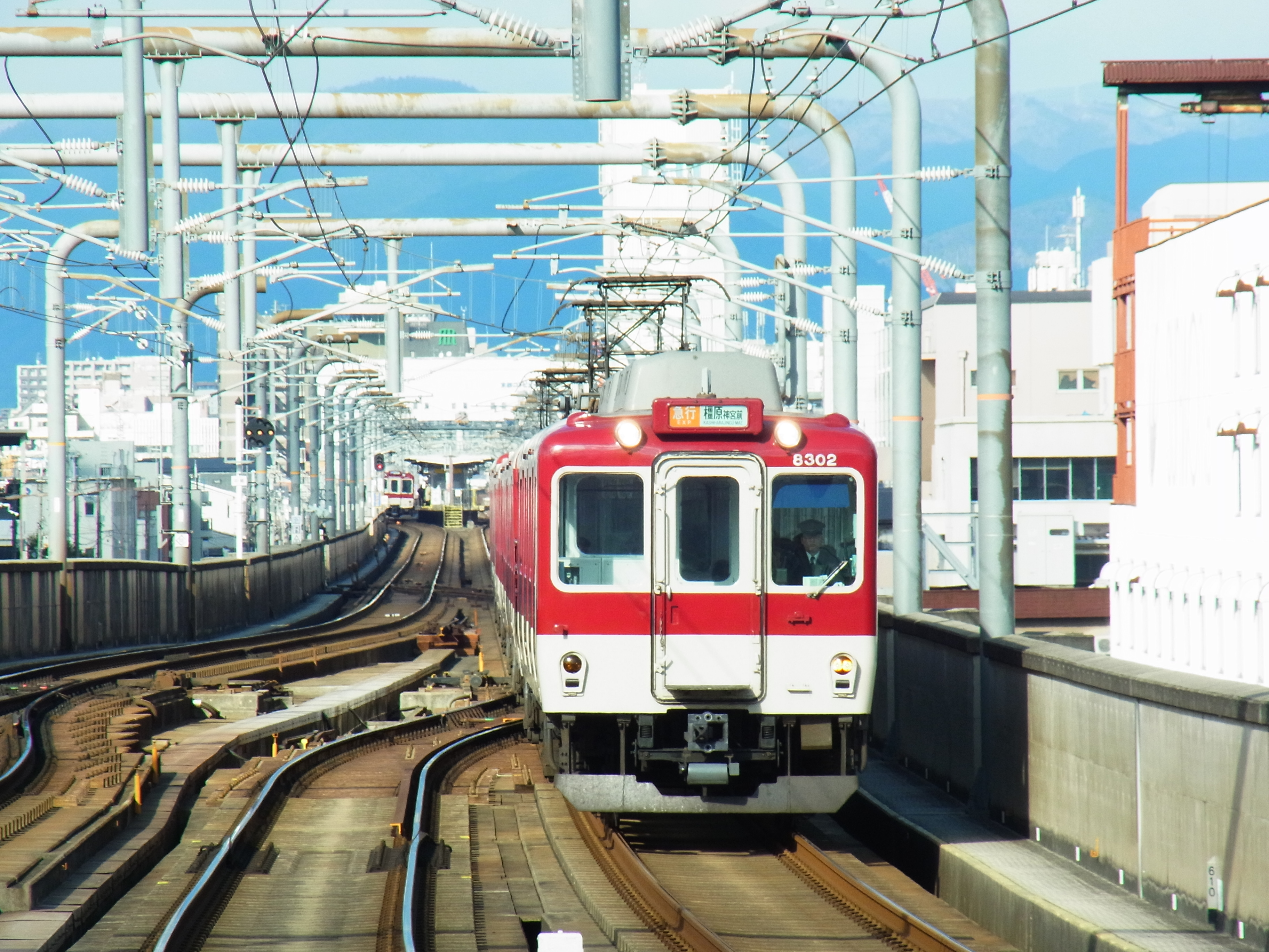 上鳥羽口駅にて 2013.1.10